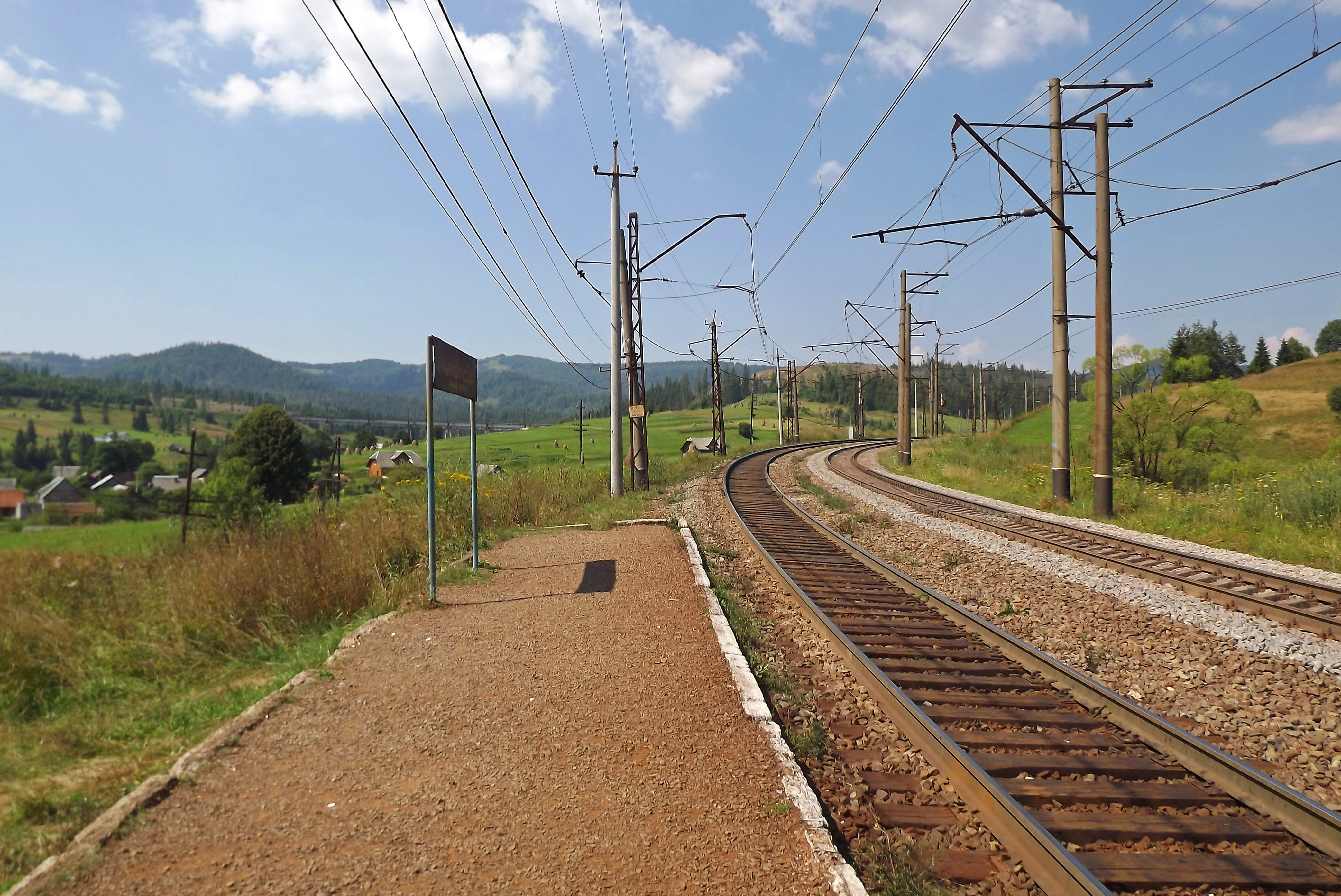 Зупинний пункт Опорець (Сколівський район, Львівська область), серпень 2015 року